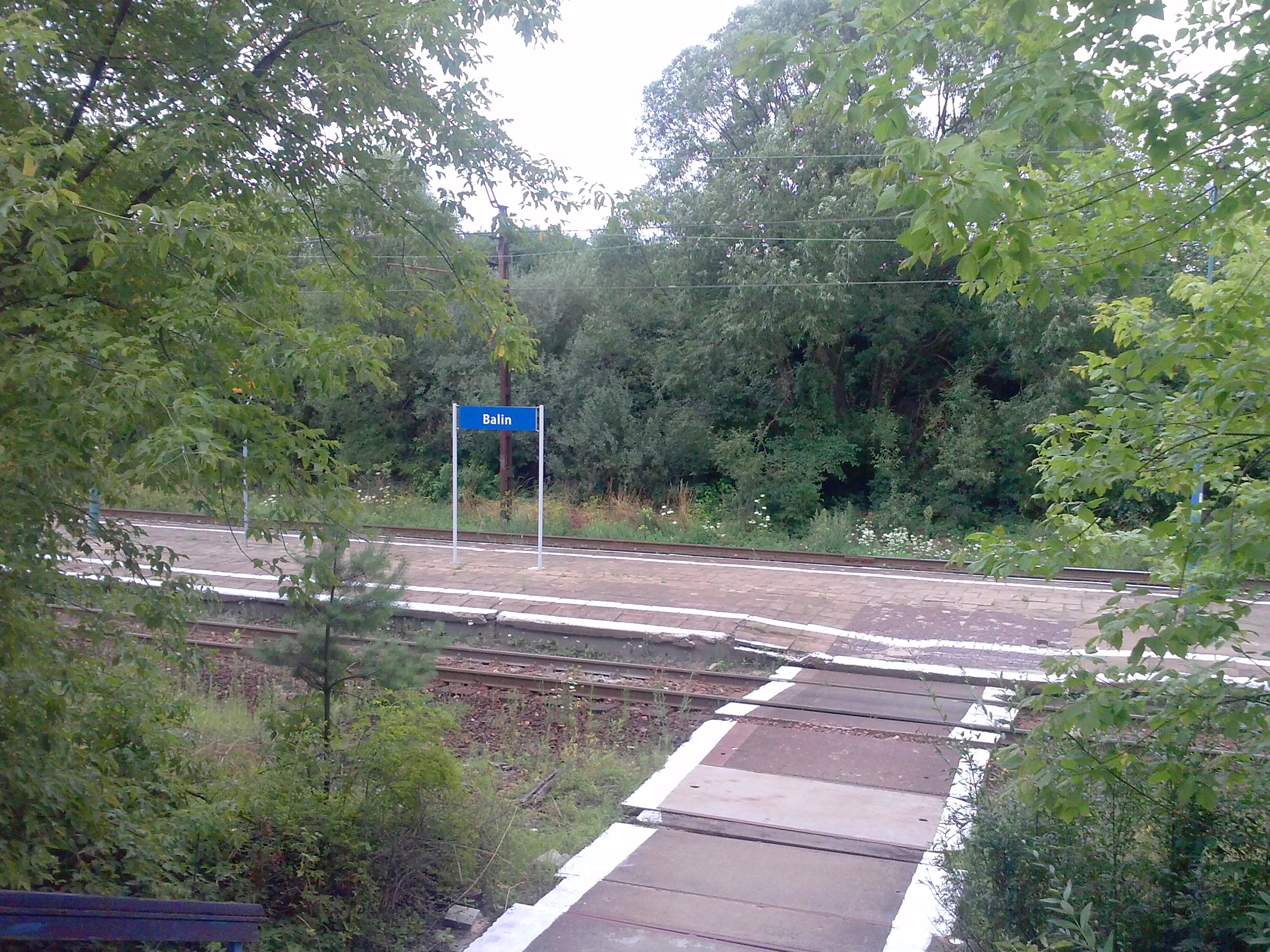 Stacja, Dworzec kolejowy w Balin